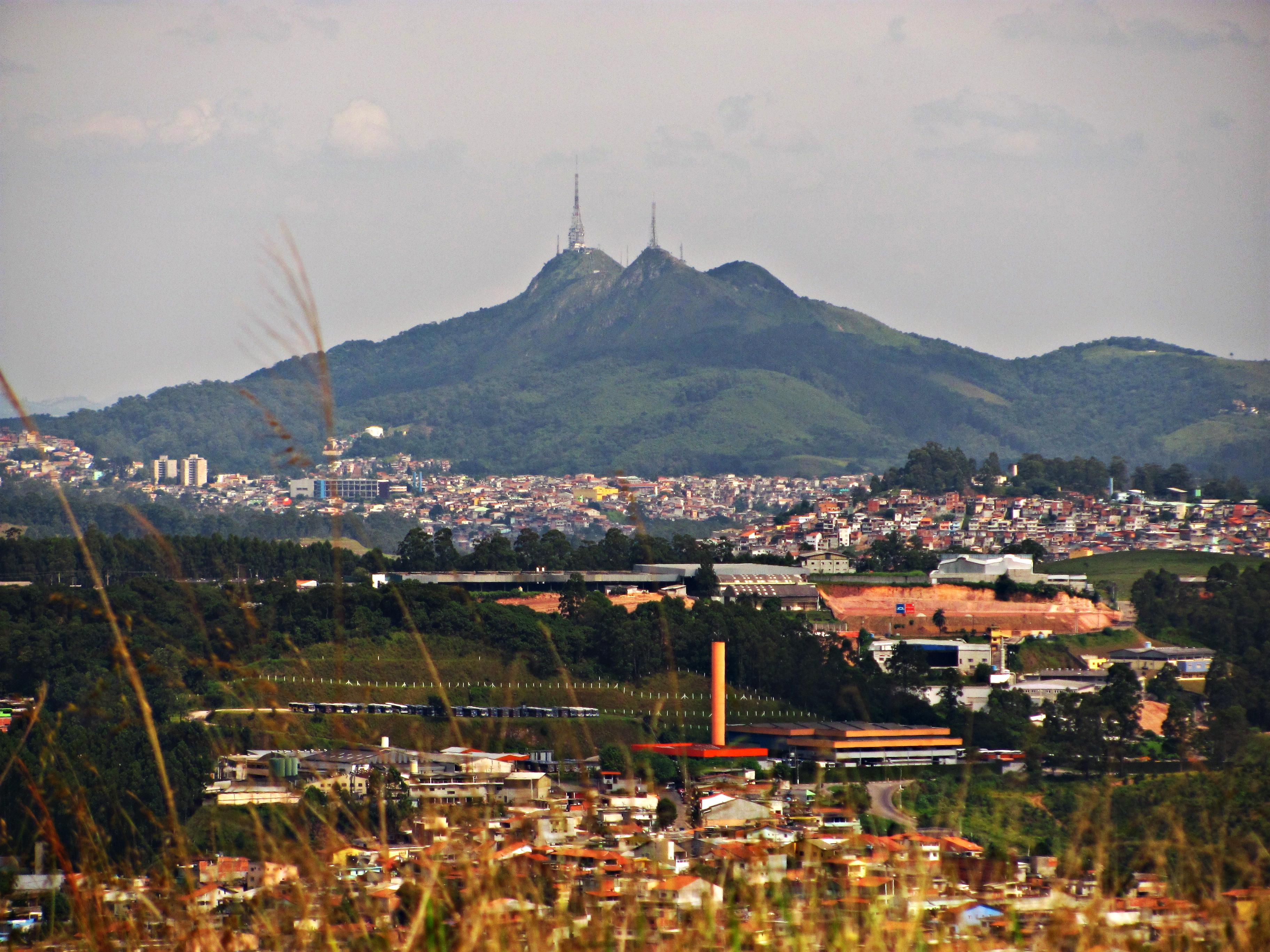 Vista do distrito de Perus, do Pico do Jaraguá e de parte de Caieiras. A foto foi tirada em Franco da Rocha, no Parque Estadual do Juqueri.